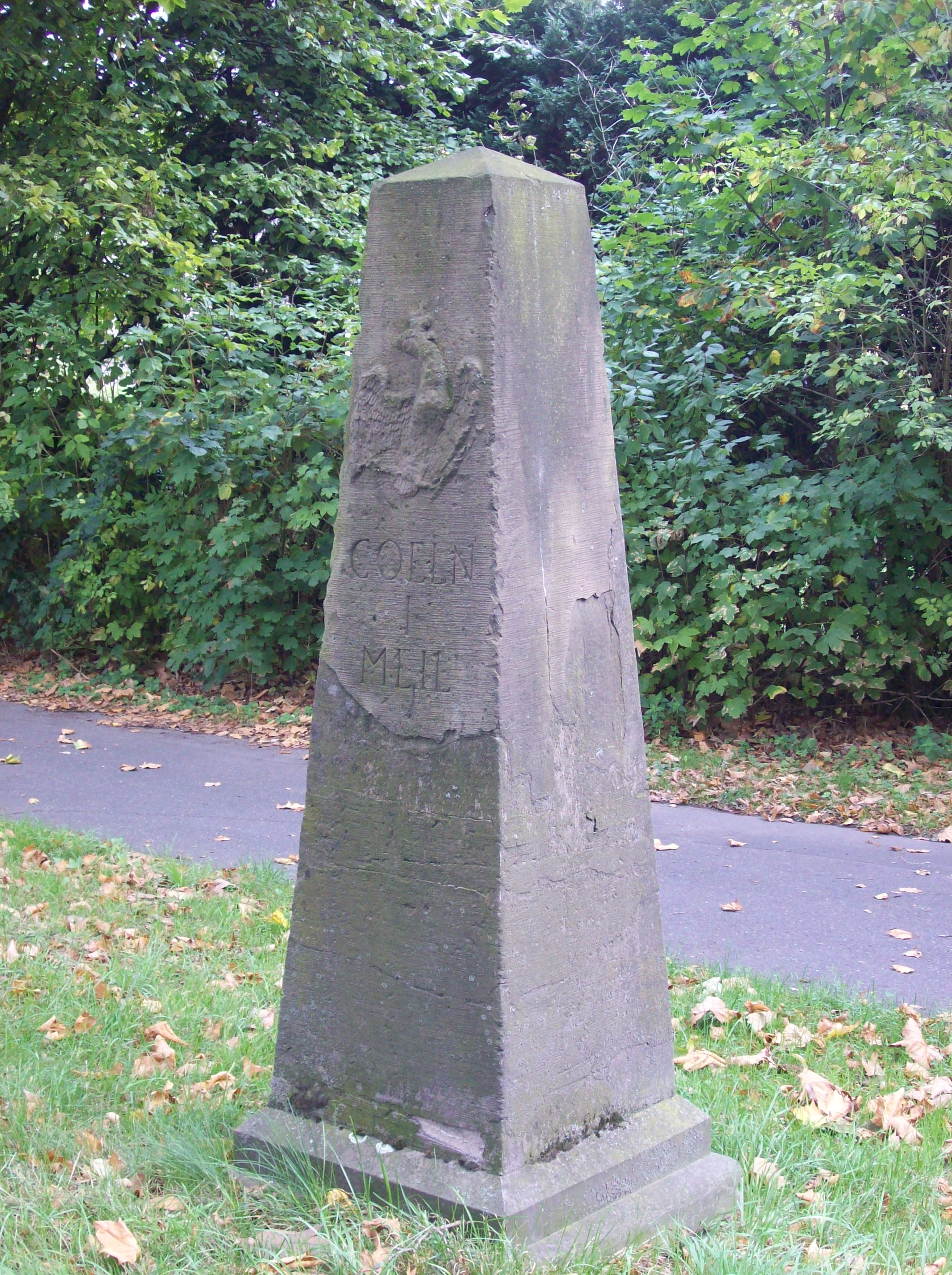 Historischer Meilenstein in Köln-Ostheim, Frankfurter Straße